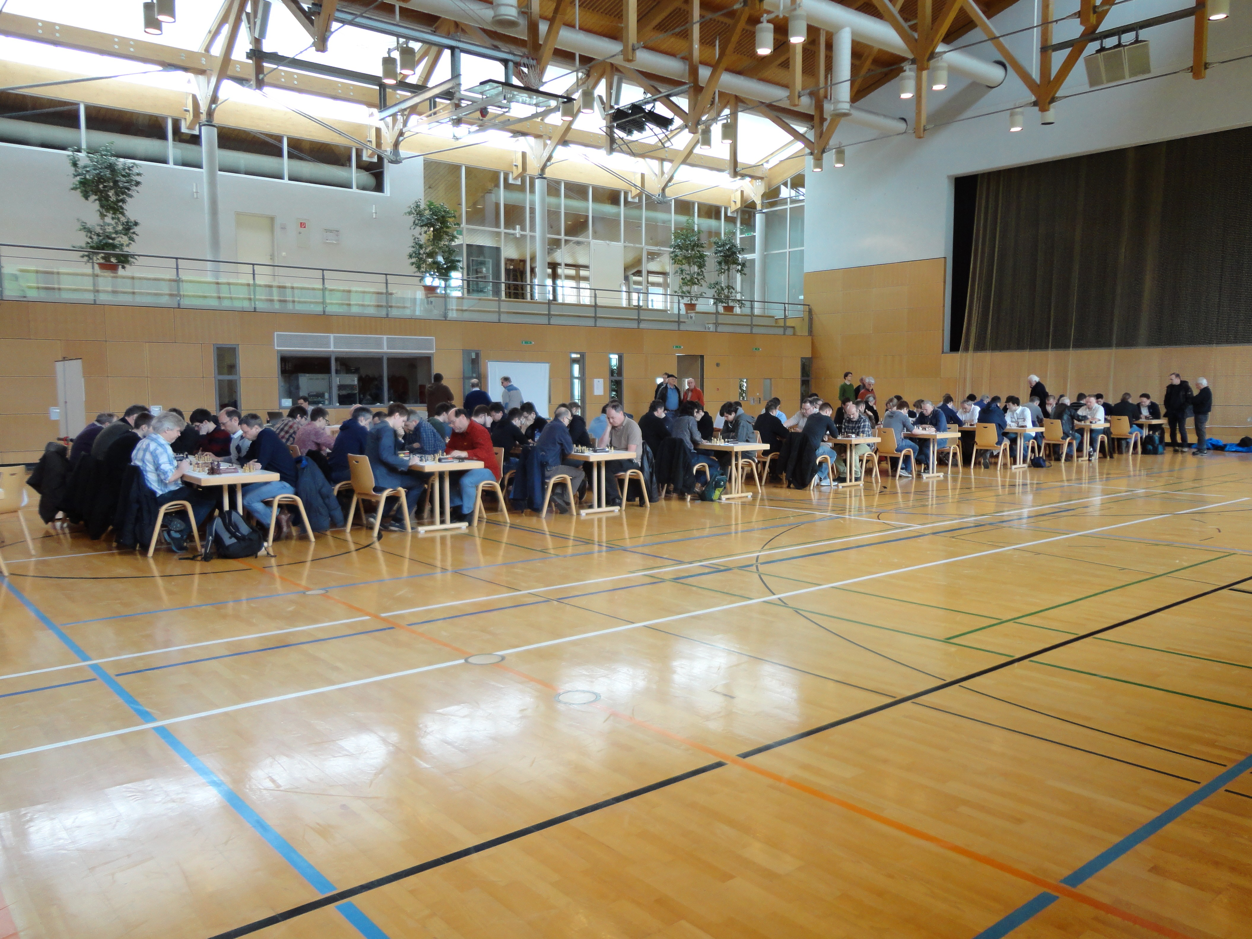 Die Schönberghalle in Ebringen, wo am 28. Februar 2016 die Badischen Blitz-Mannschaftsmeisterschaften im Schach stattfanden, die vom Schachclub Ebringen ausgerichtet wurden